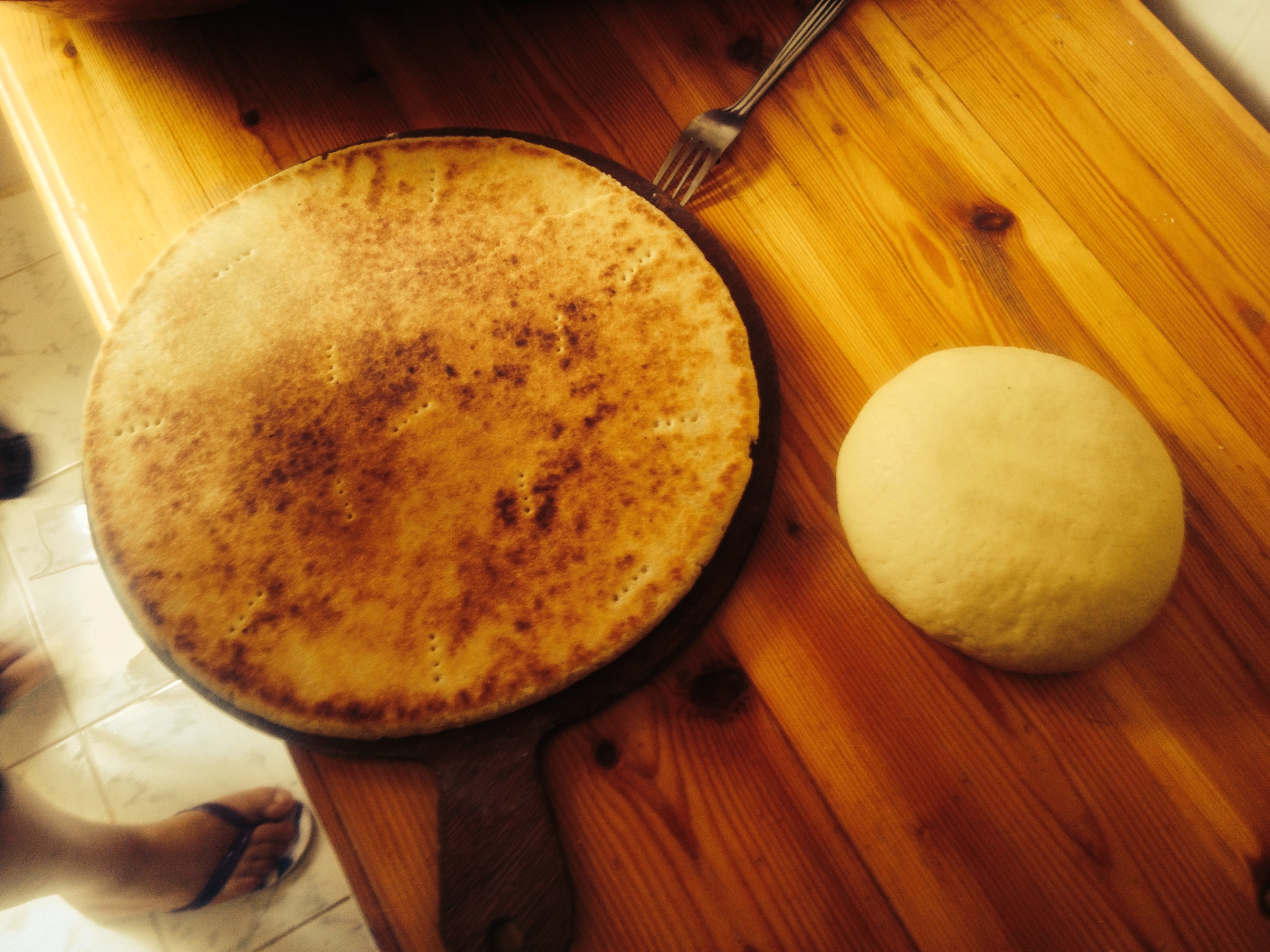 Kesra algérienne